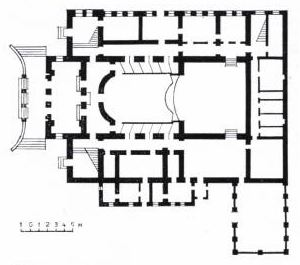 План будынка Магілёўскага гарадскога тэатра